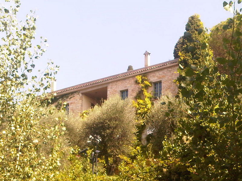 Mas Notre-Dame de Vie, Mougins, France